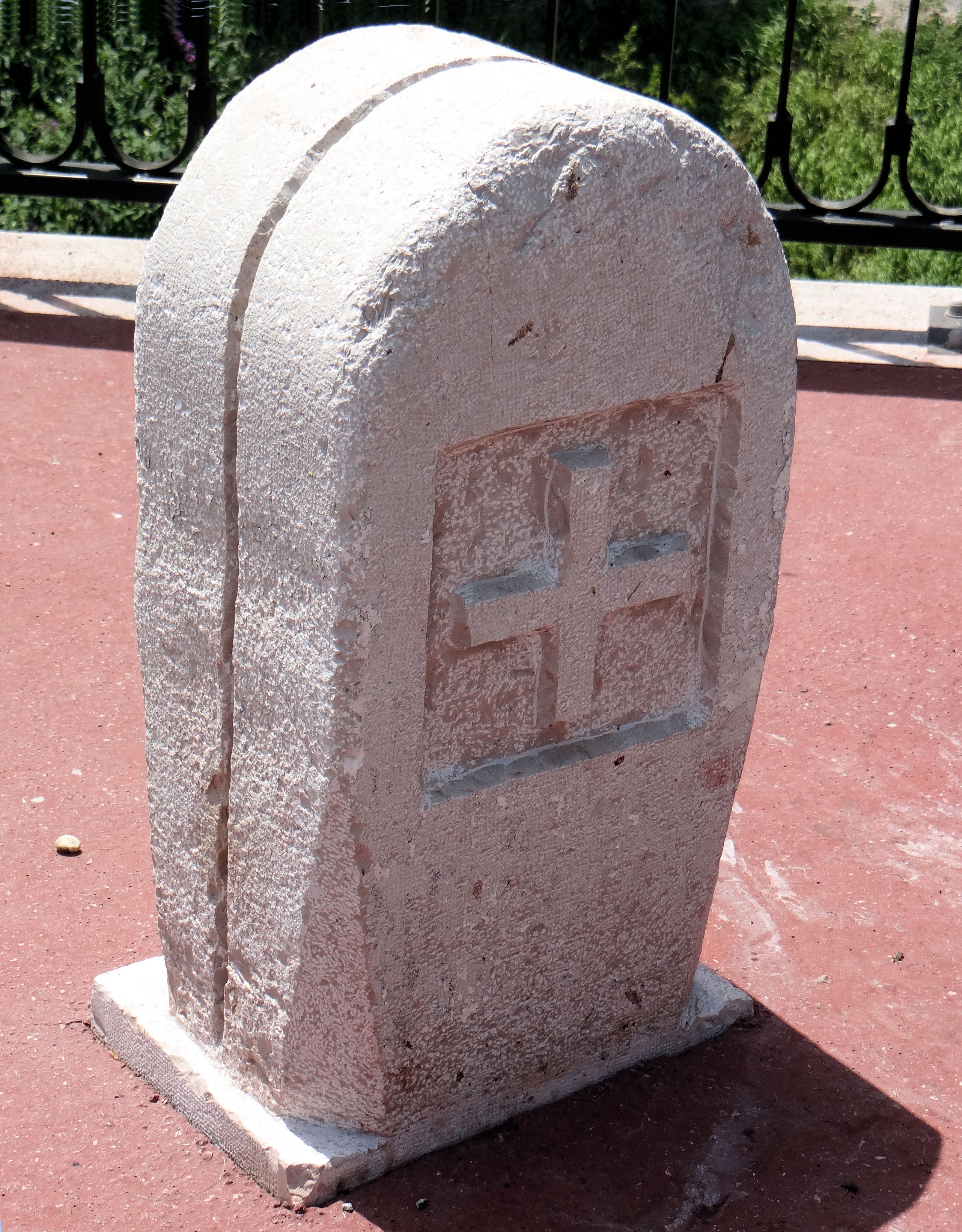 Roquestéron-Grasse - Borne frontière sur le pont avec les armes du duc de Savoie